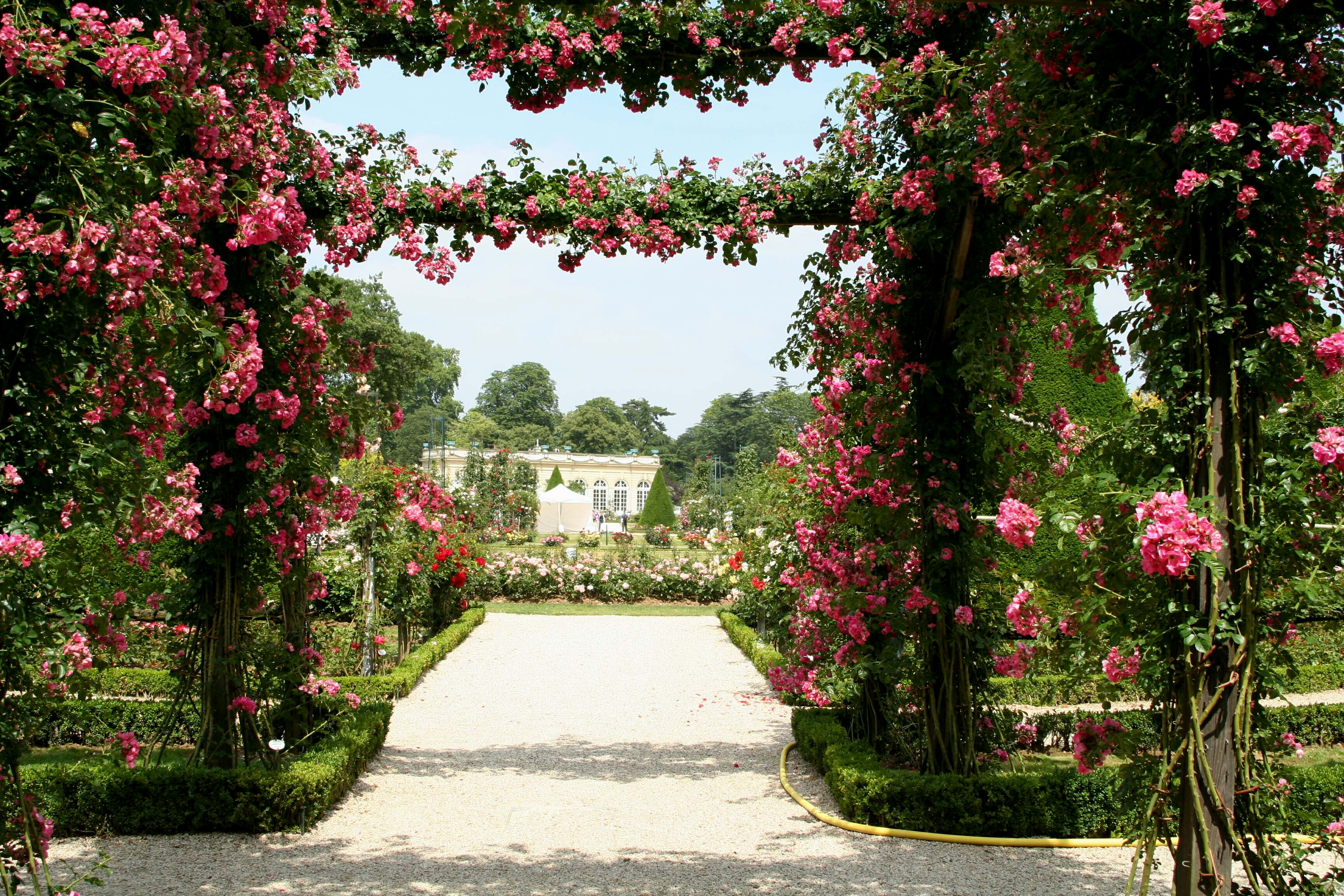 Rosa 'American Pillar', roseraie de Bagatelle - Paris (France).